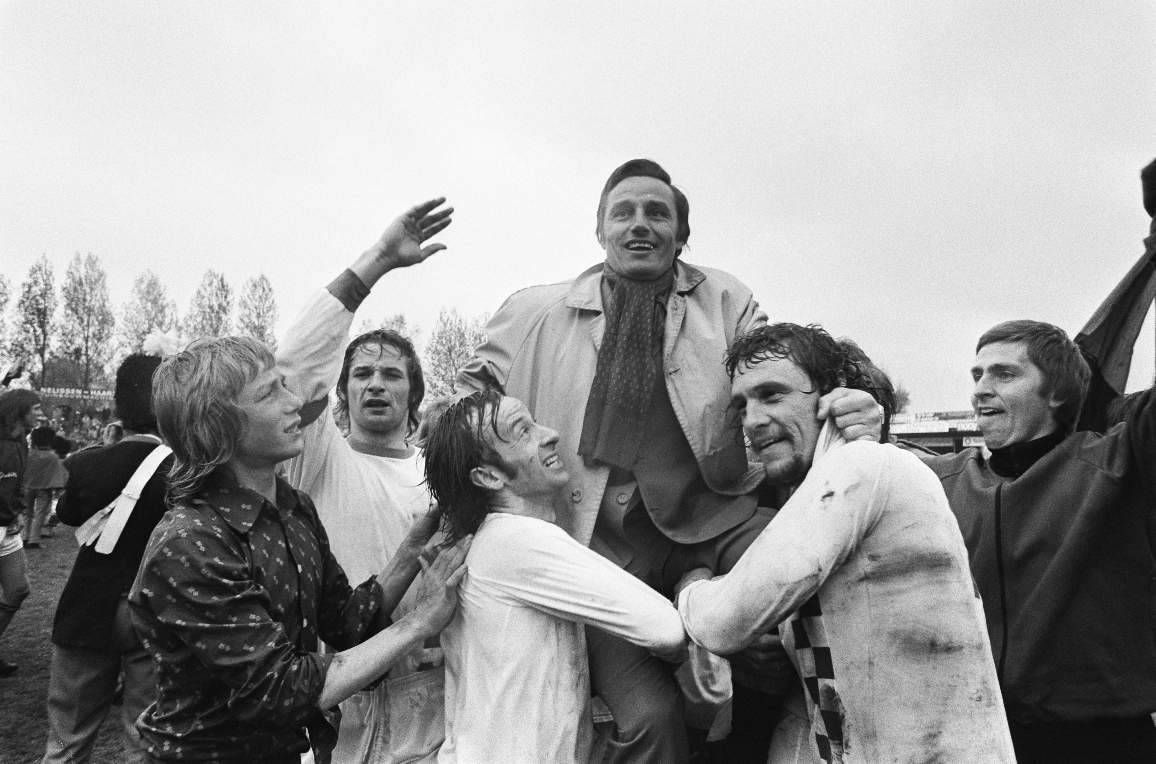 Collectie / Archief : Fotocollectie Anefo Reportage / Serie : Volendam-NEC 1-1 Beschrijving : Trainer De Visser op de schouders na het behalen van het kampioenschap van de eerste divisie Datum : 11 mei 1975 Locatie : Noord-Holland, Volendam Trefwoorden : kampioenen, spelers, sport, trainers, voetbal Persoonsnaam : Visser, Piet de Fotograaf : Fotograaf Onbekend / Anefo Auteursrechthebbende : Nationaal Archief Materiaalsoort : Negatief (zwart/wit) Nummer archiefinventaris : bekijk toegang 2.24.01.05 Bestanddeelnummer : 927-9200